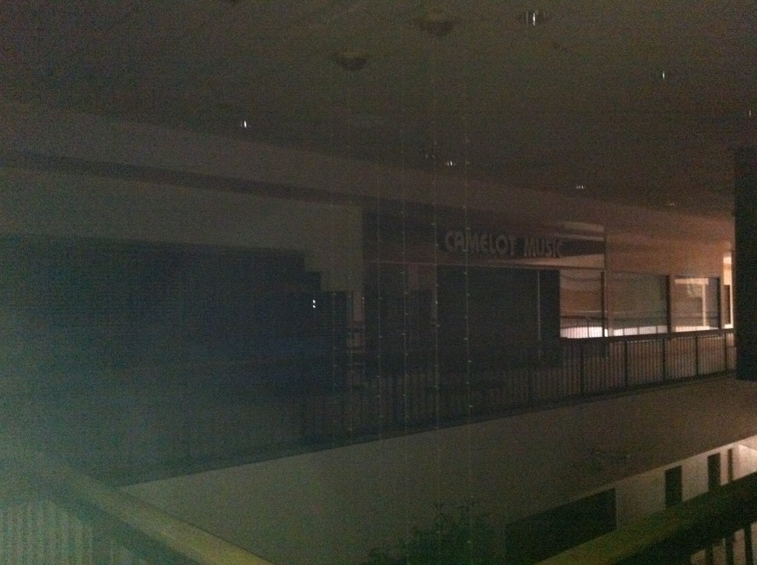 Camelot Music